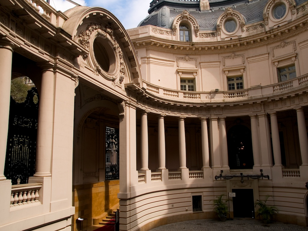 Courtyard - San Martín Palace, Buenos Aires